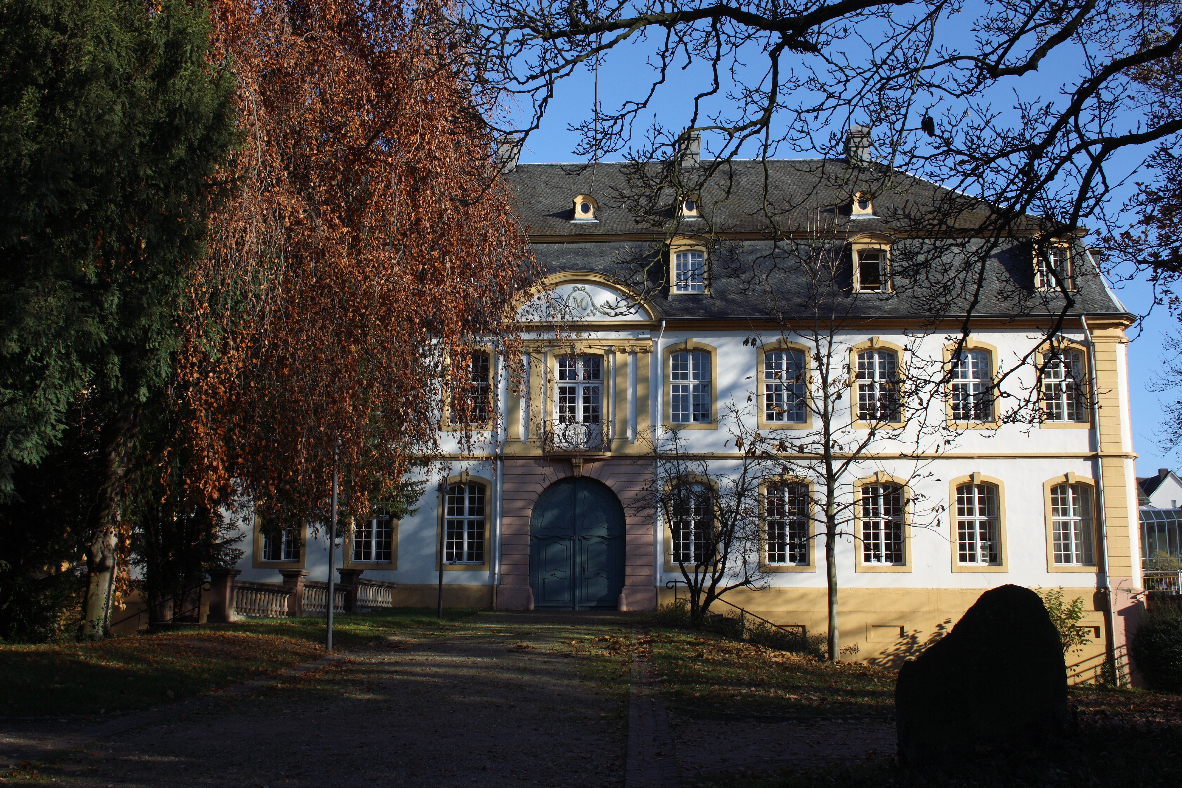 Marienburg in Vallendar im Landkreis Mayen-Koblenz (Rheinland-Pfalz), Heerstraße 52, jetzt Sitz der WHU – Otto Beisheim School of Management